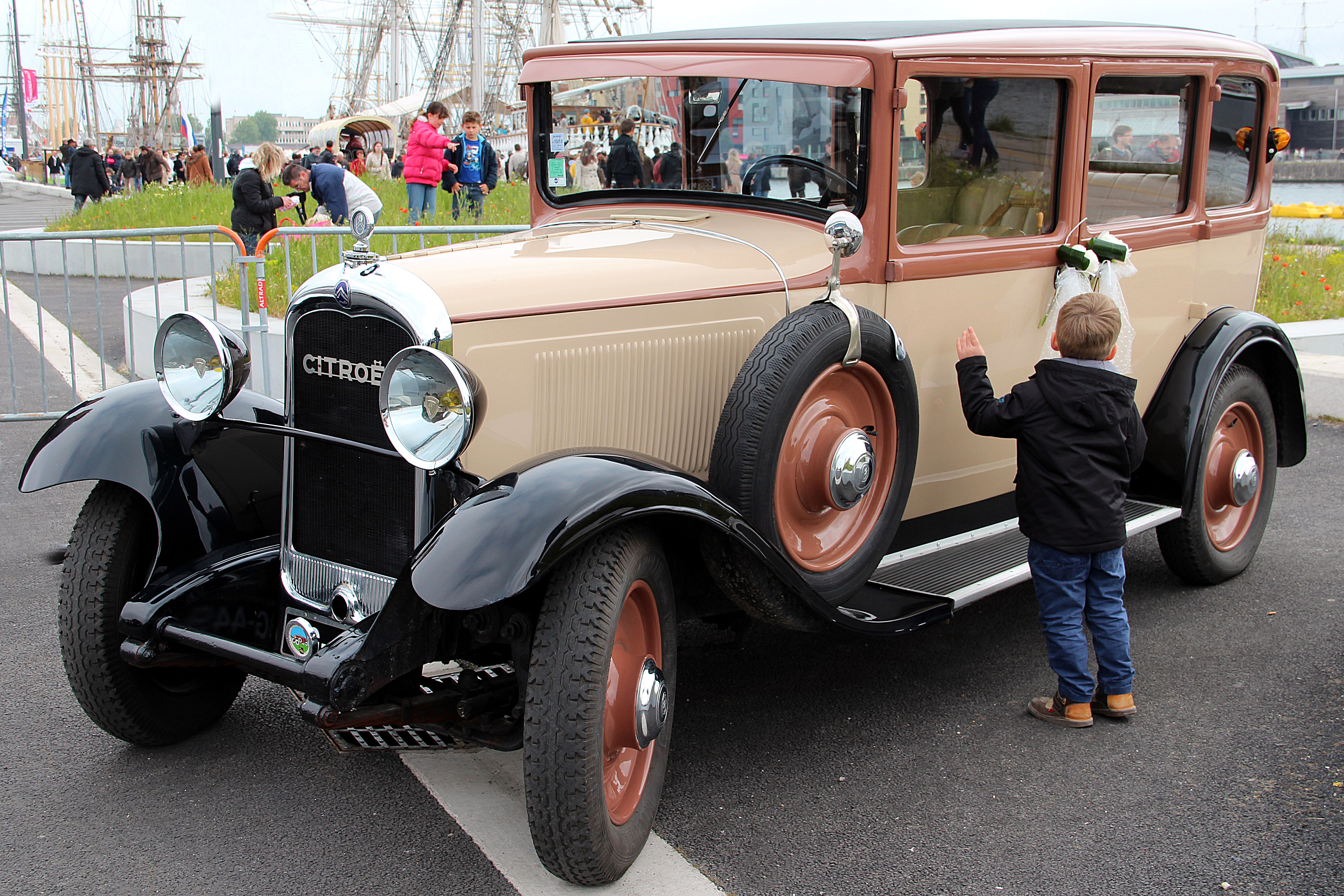 Berline Citroën C4 à Dunkerque, (France).